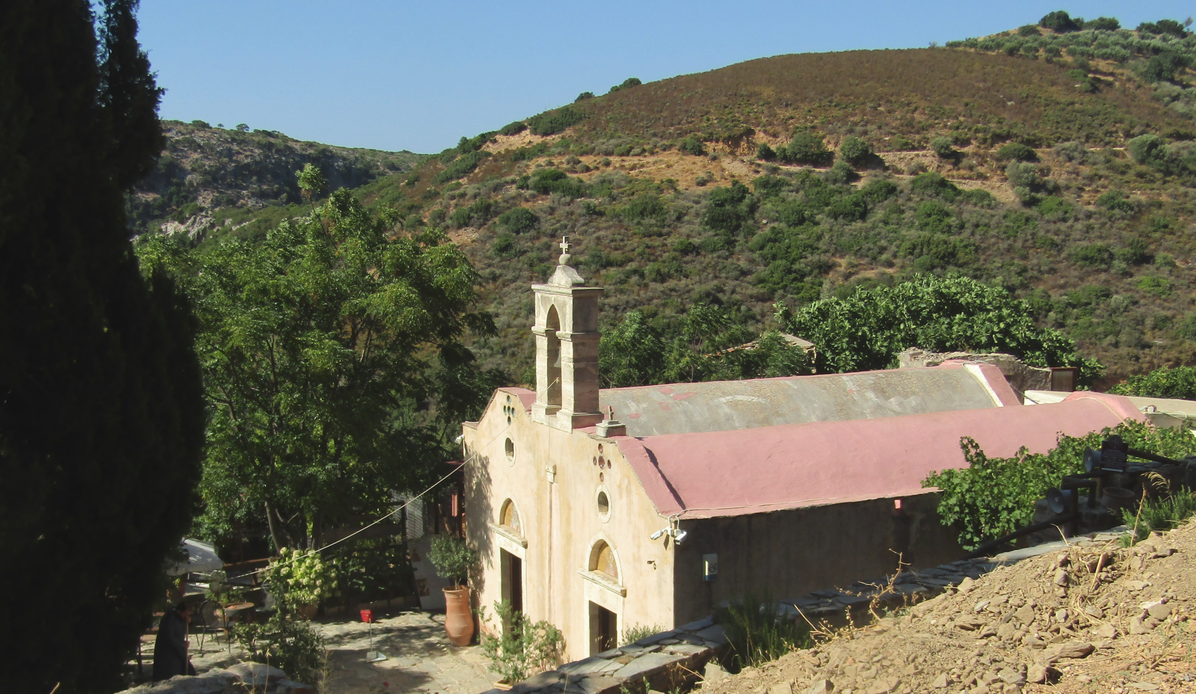 Monastero di San Panteleone (Fodele, Creta)